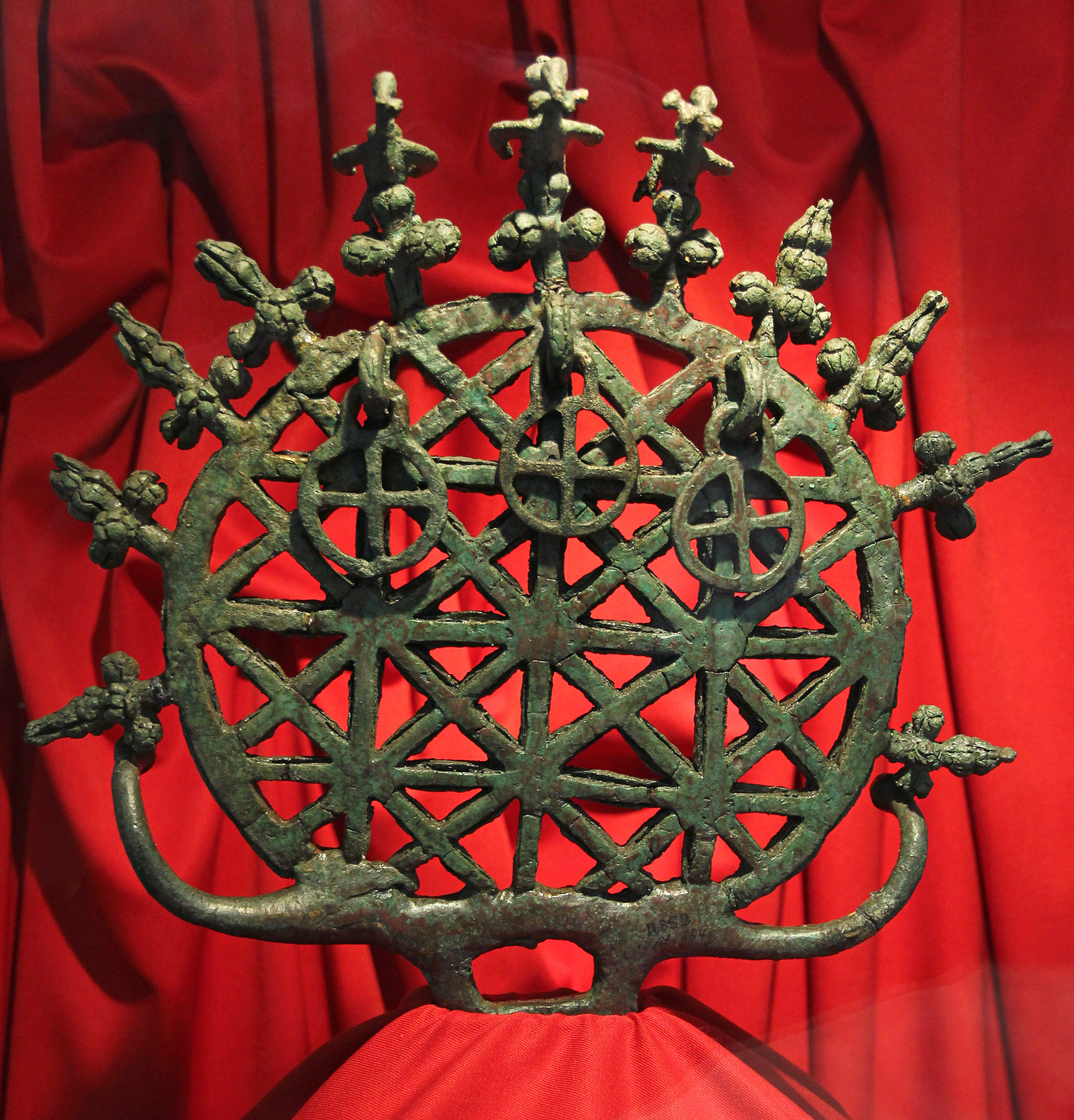 Standarte aus Alaca Höyük in Scheibenform mit Gitter, genannt "Sonnenscheibe", im Museum für anatolische Zivilisationen in Ankara